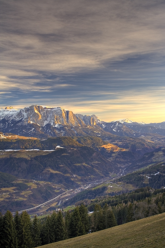 Eisacktal, im Hintergrund das Schlernmassiv, HDR